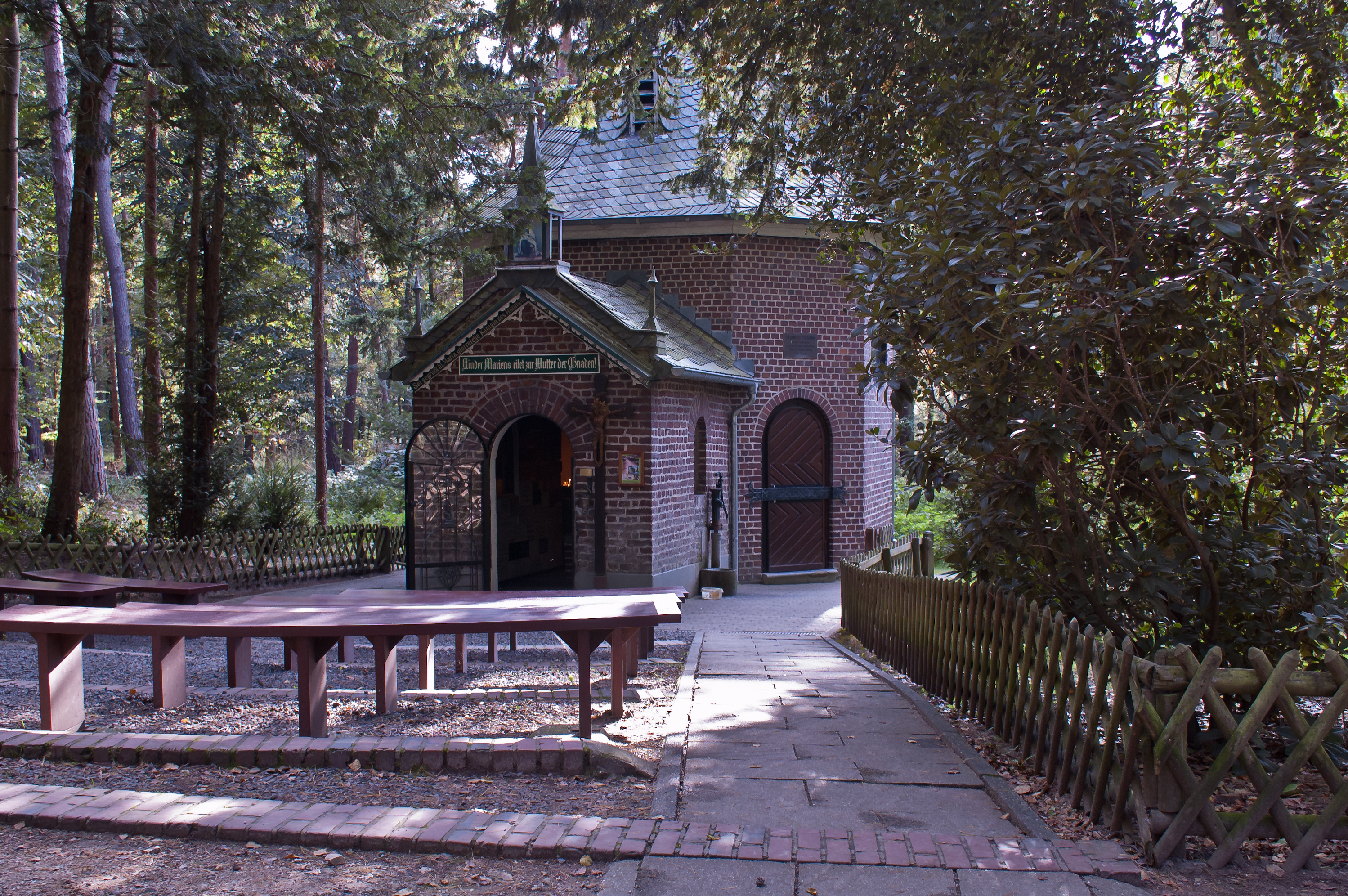 Wallfahrtskapelle zum Birgeler Pützchen im Wald zwischen Birgelen und der Wassenberger Oberstadt